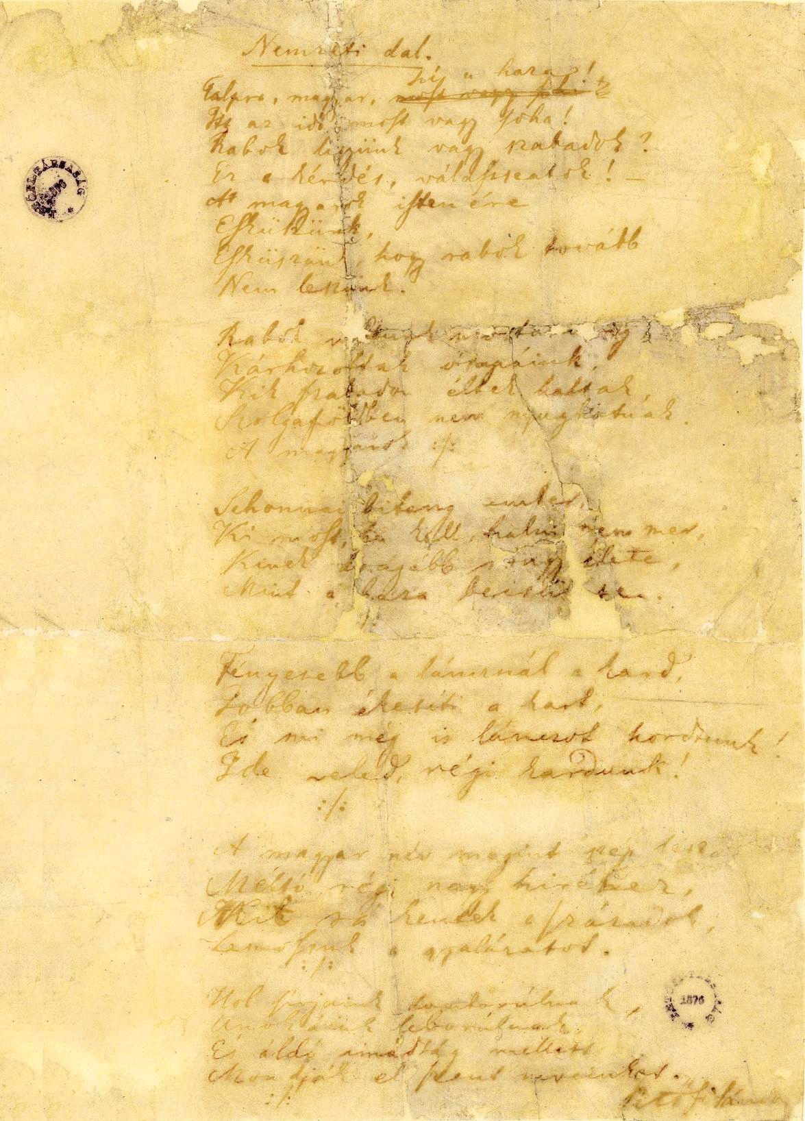 A Nemzeti dal kézirata Nemzeti dal Talpra magyar, hí a haza! Itt az idő, most vagy soha! Rabok legyünk, vagy szabadok? Ez a kérdés, válasszatok! - A magyarok istenére Esküszünk, Esküszünk, hogy rabok tovább Nem leszünk! Rabok voltunk mostanáig, Kárhozottak ősapáink, Kik szabadon éltek-haltak, Szolgaföldben nem nyughatnak. A magyarok istenére Esküszünk, Esküszünk, hogy rabok tovább Nem leszünk! Sehonnai bitang ember, Ki most, ha kell, halni nem mer, Kinek drágább rongy élete, Mint a haza becsülete. A magyarok istenére Esküszünk, Esküszünk, hogy rabok tovább Nem leszünk! Fényesebb a láncnál a kard, Jobban ékesíti a kart, És mi mégis láncot hordunk! Ide veled, régi kardunk! A magyarok istenére Esküszünk, Esküszünk, hogy rabok tovább Nem leszünk! A magyar név megint szép lesz, Méltó régi nagy hiréhez; Mit rákentek a századok, Lemossuk a gyalázatot! A magyarok istenére Esküszünk, Esküszünk, hogy rabok tovább Nem leszünk! Hol sírjaink domborulnak, Unokáink leborulnak, És áldó imádság mellett Mondják el szent neveinket. A magyarok istenére Esküszünk, Esküszünk, hogy rabok tovább Nem leszünk!